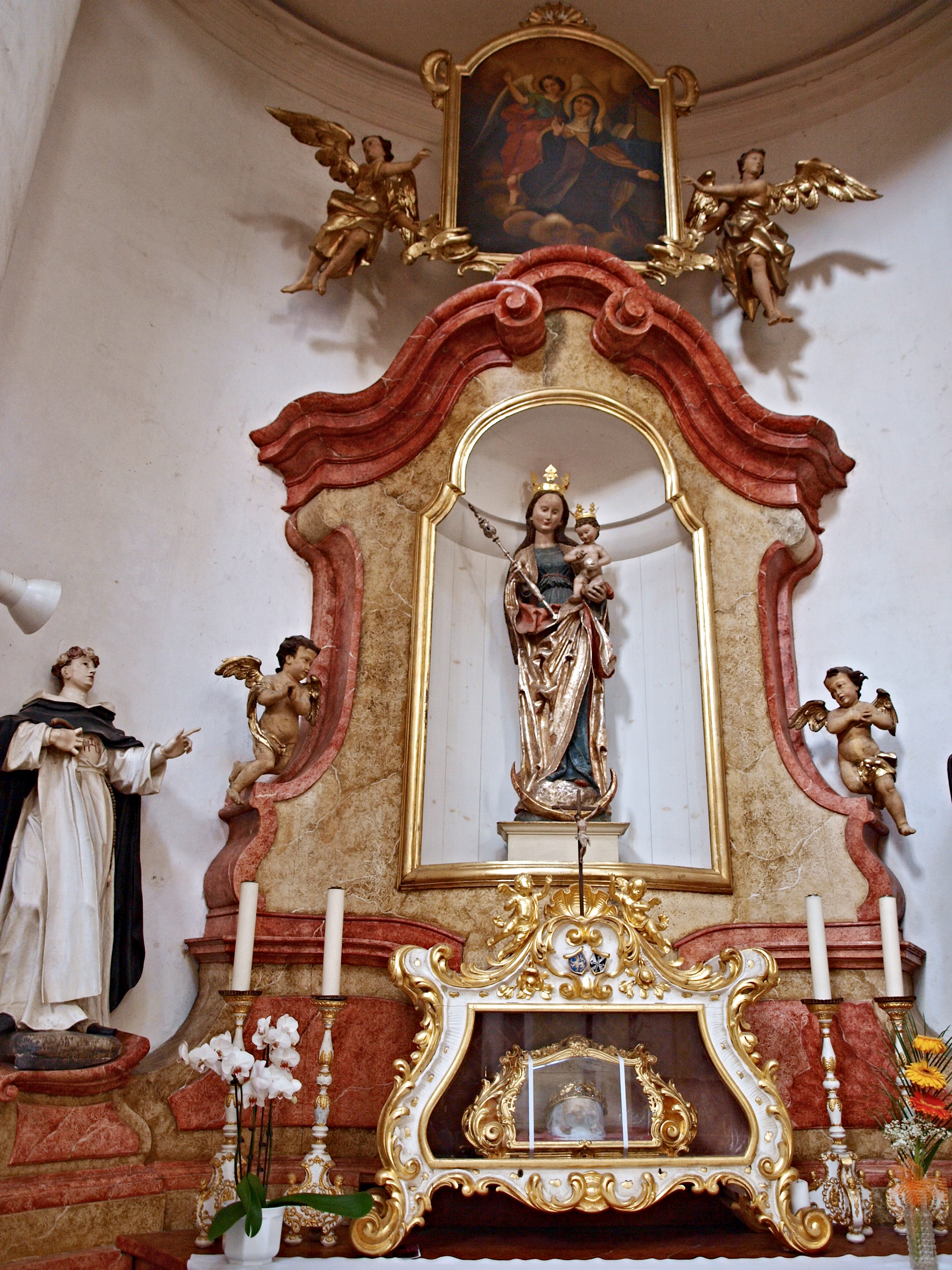 Jablonné v Podještědí - klášter (2)